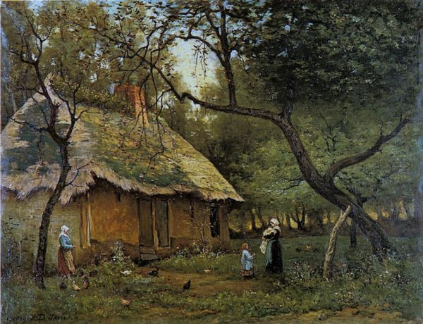 masure